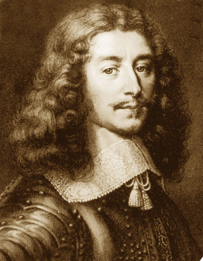 Duc François VI de La Rochefoucauld, auteur des Maximes, gravure